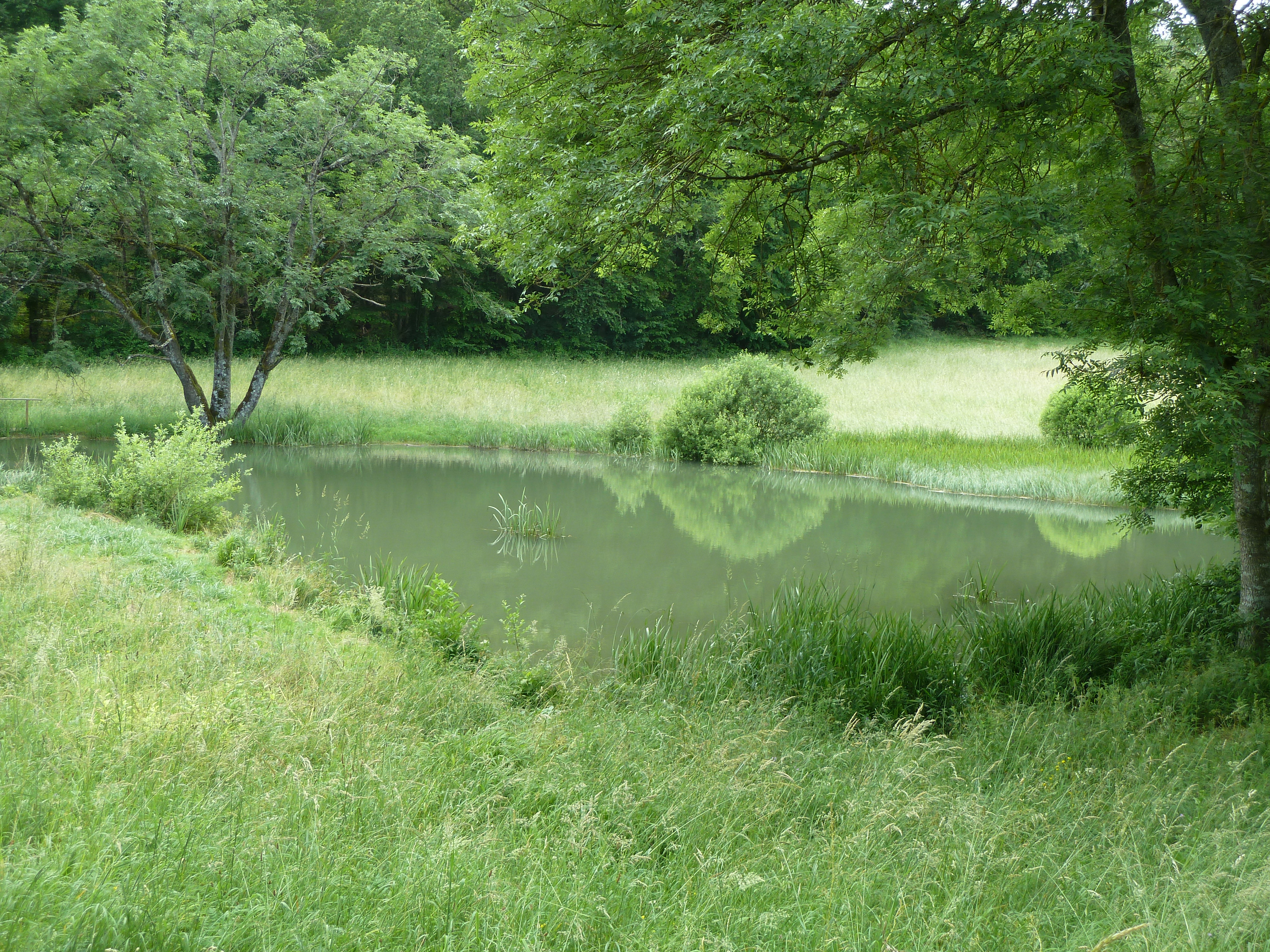 Jouy-sous-les-Côtes Etang de Jévaux